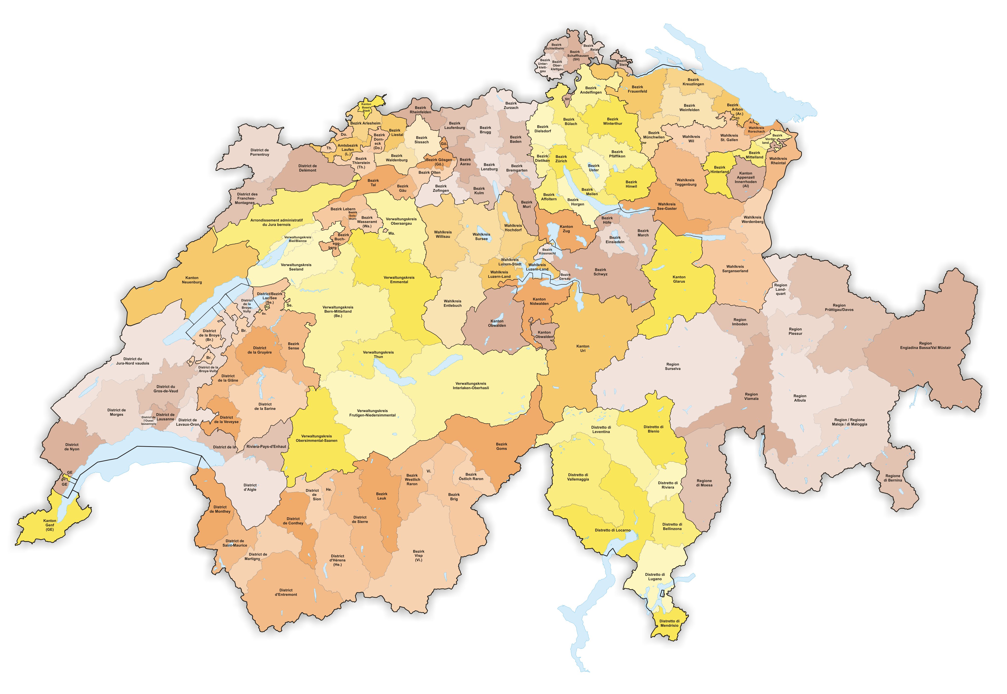 Districts in Switzerland